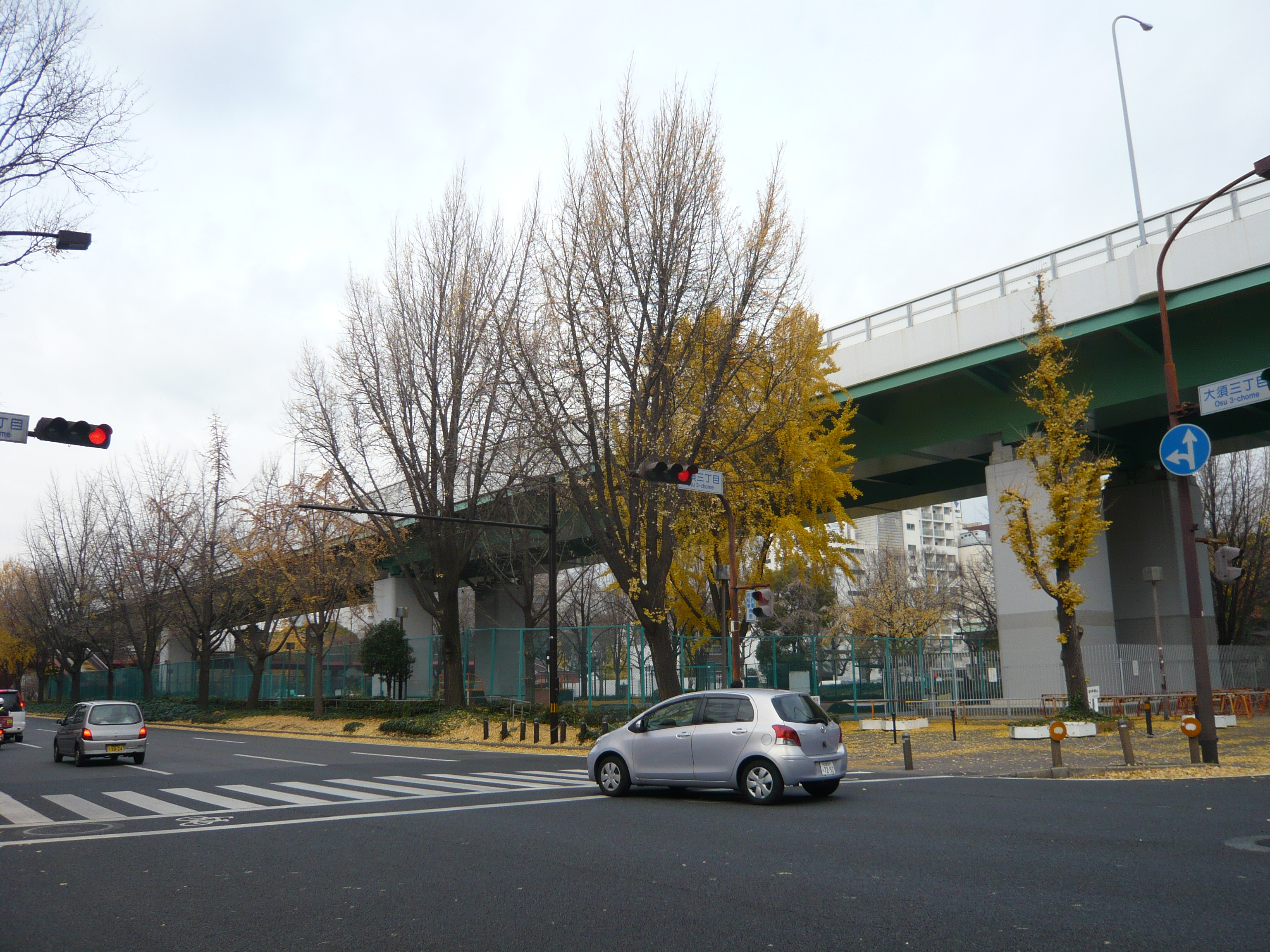 若宮大通り